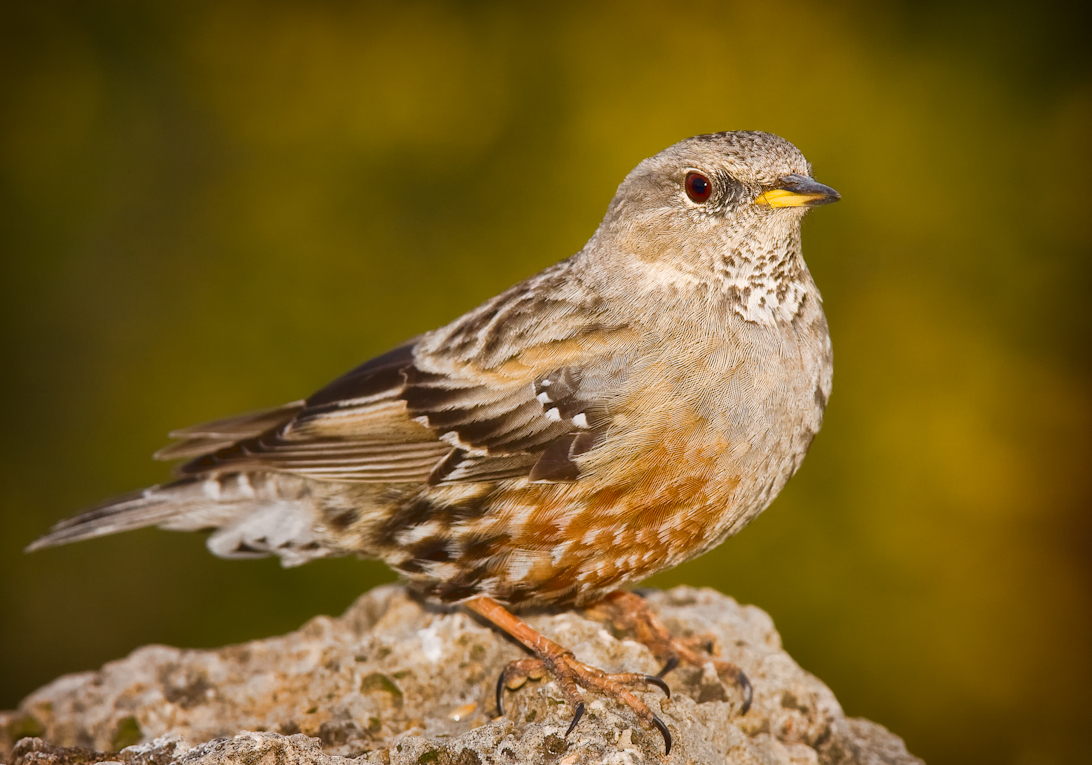 Alpine Accentor, Prunella collaris, Castellón, Valencia, Spain